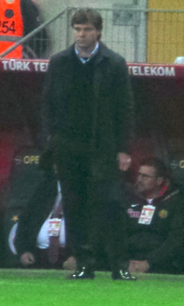 Ertuğrul Sağlam'14